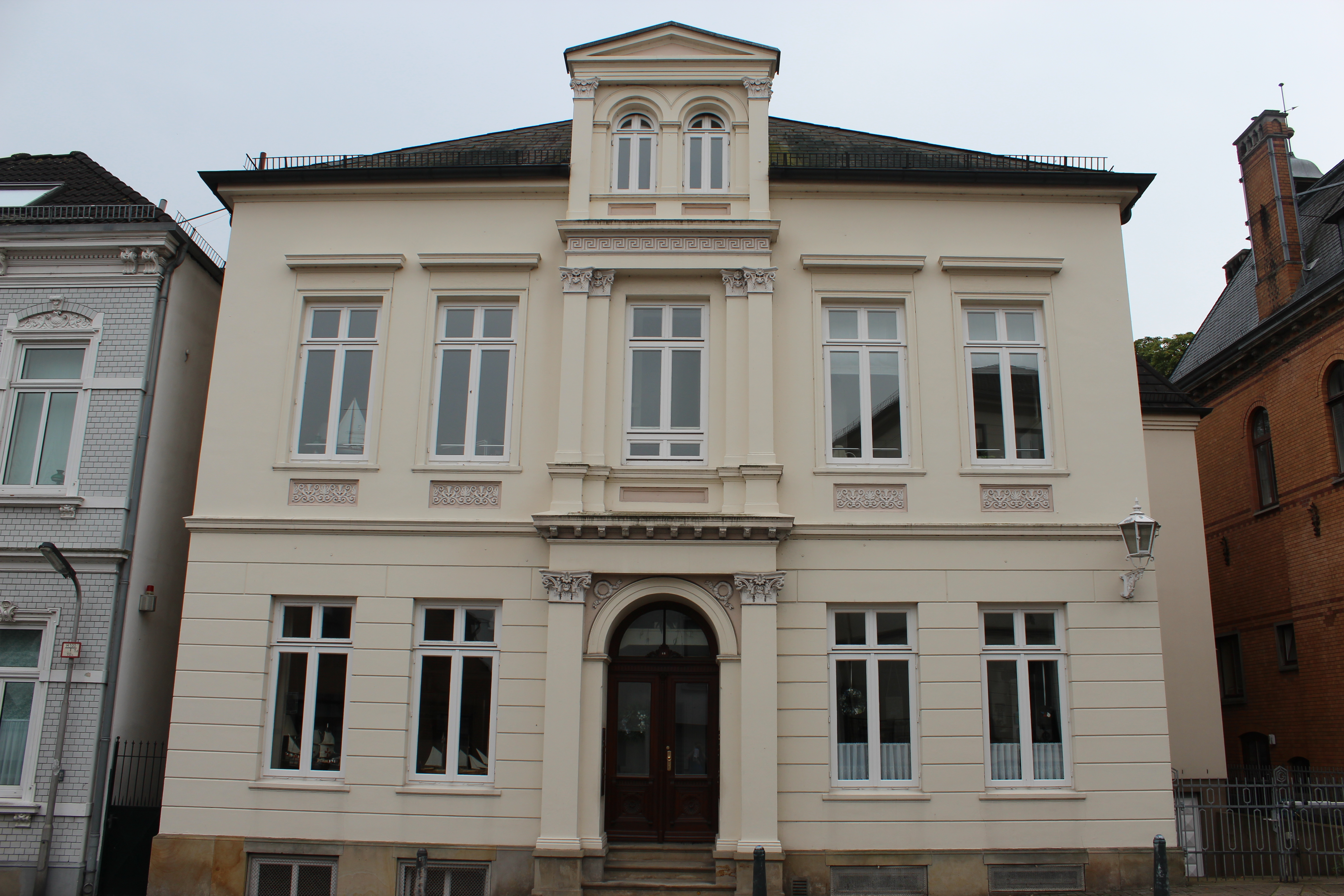 Villa Steinbrügge in Bremen, Weserstraße 85.Das abgebildete Objekt ist ein geschütztes Kulturdenkmal in der Freien Hansestadt Bremen, mit der Nr. 1338 beim Landesamt für Denkmalpflege registriert.